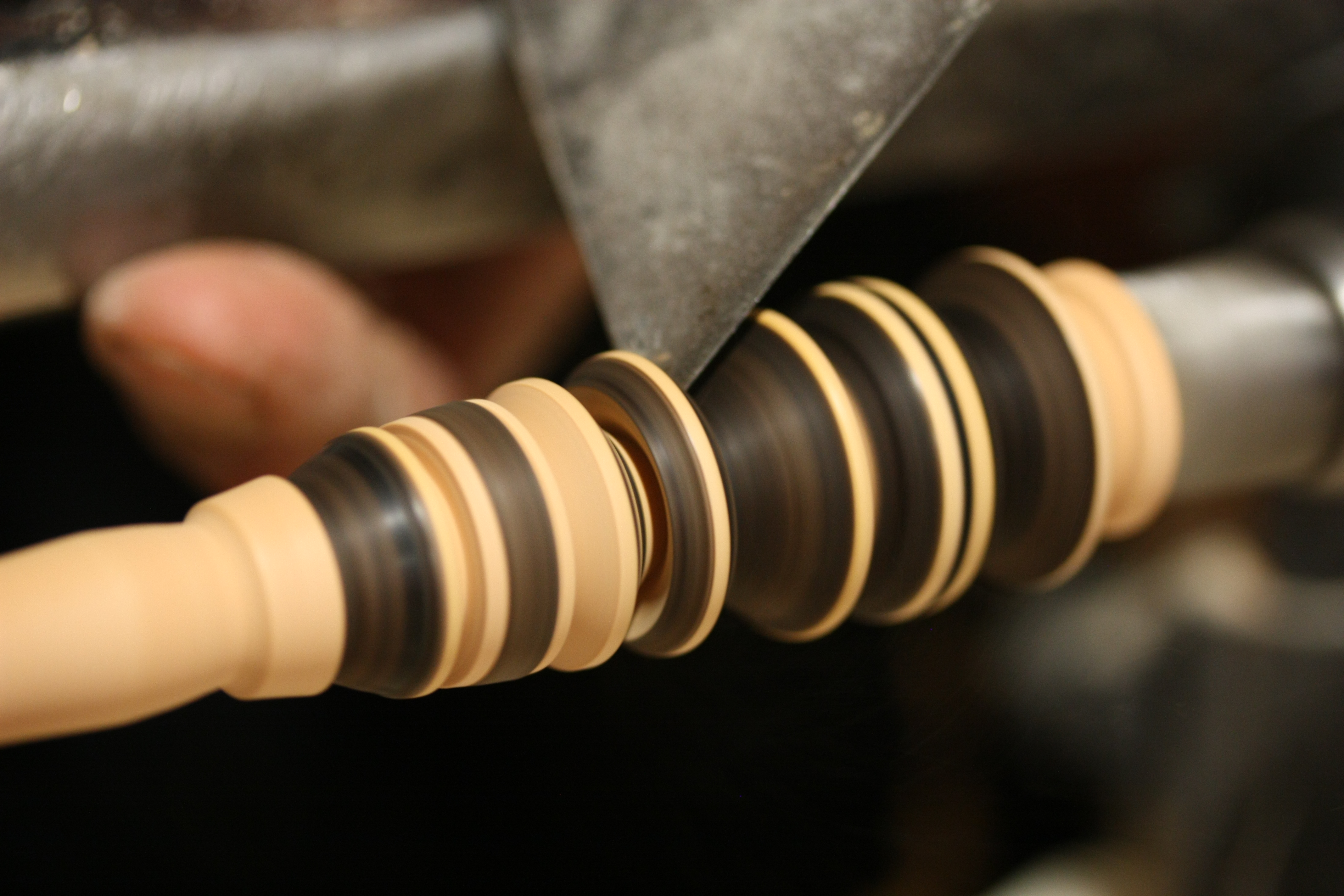 Detalle del proceso de elaboración de un molinillo de madera